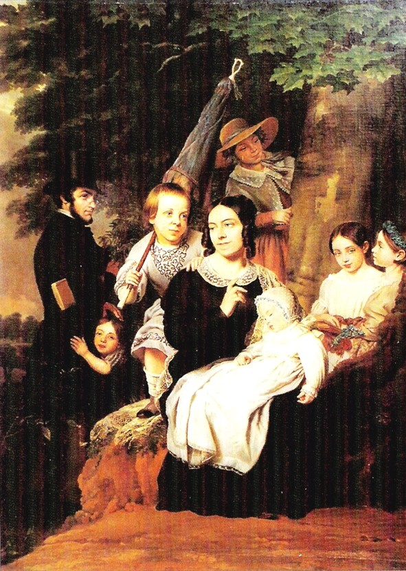 Франсуа Анж. Семья Константина и Клэр-Зое Эже около 1846 года.